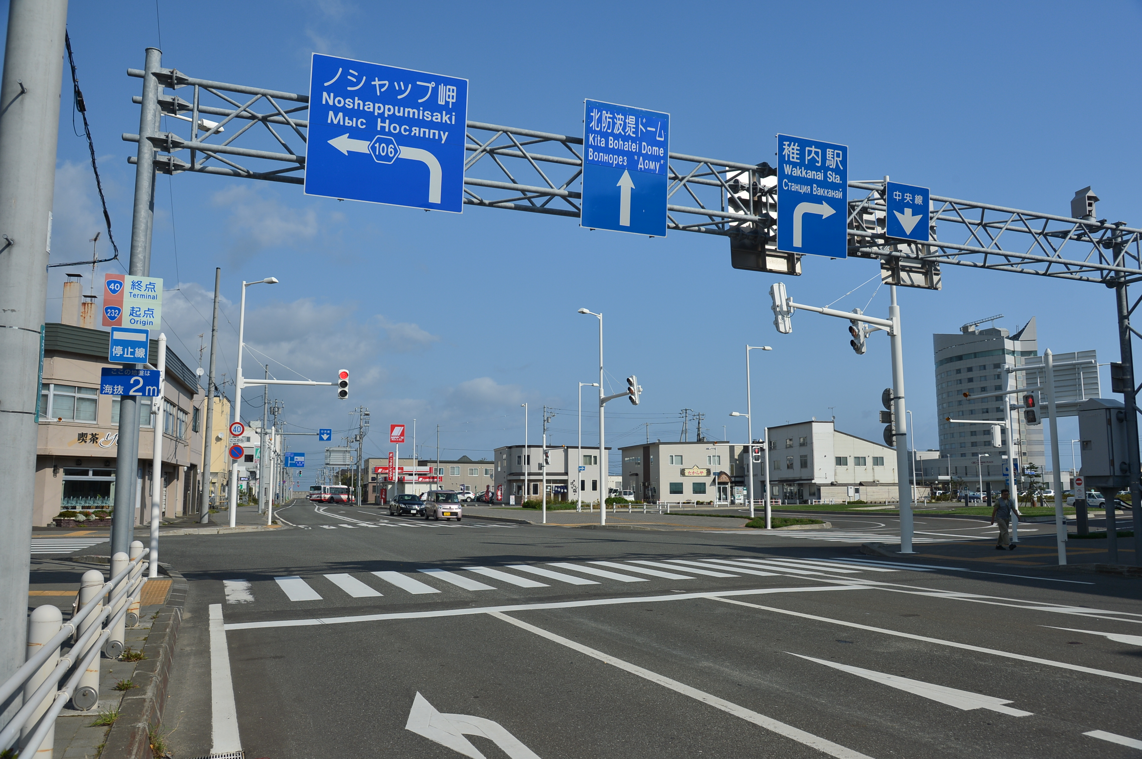 国道40号終点および、国道232号起点（北海道稚内市）